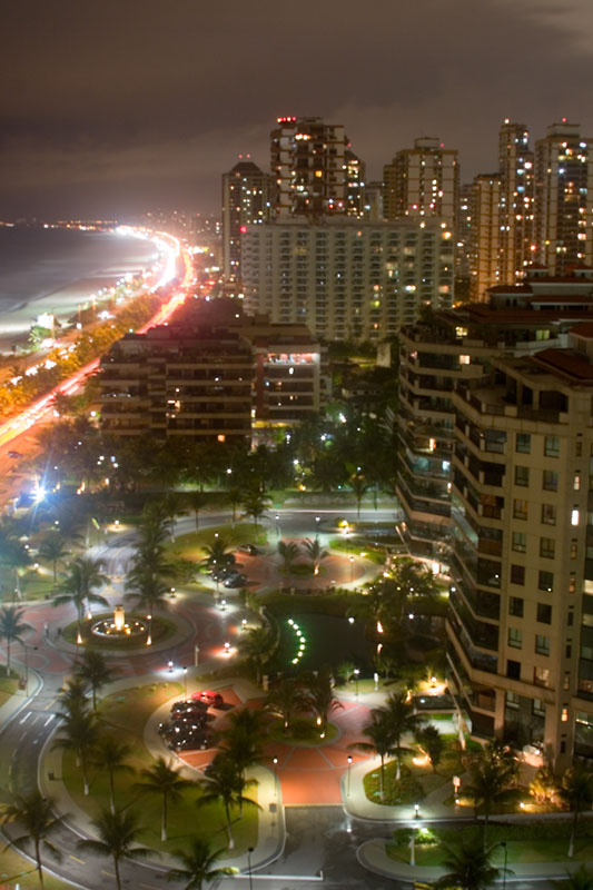 Barra da Tijuca - Rio de Janeiro, Brasil.